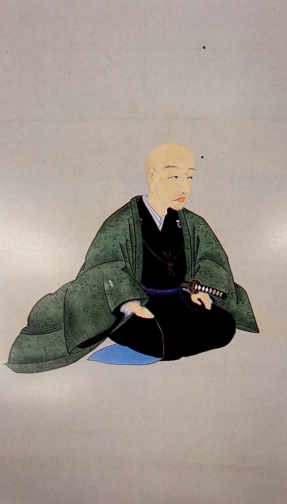 那須資礼の肖像。